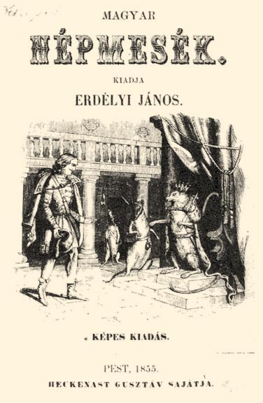 Erdélyi János Magyar népmesék című művének címlapja (Heckenast Gusztáv, Pest, 1855)